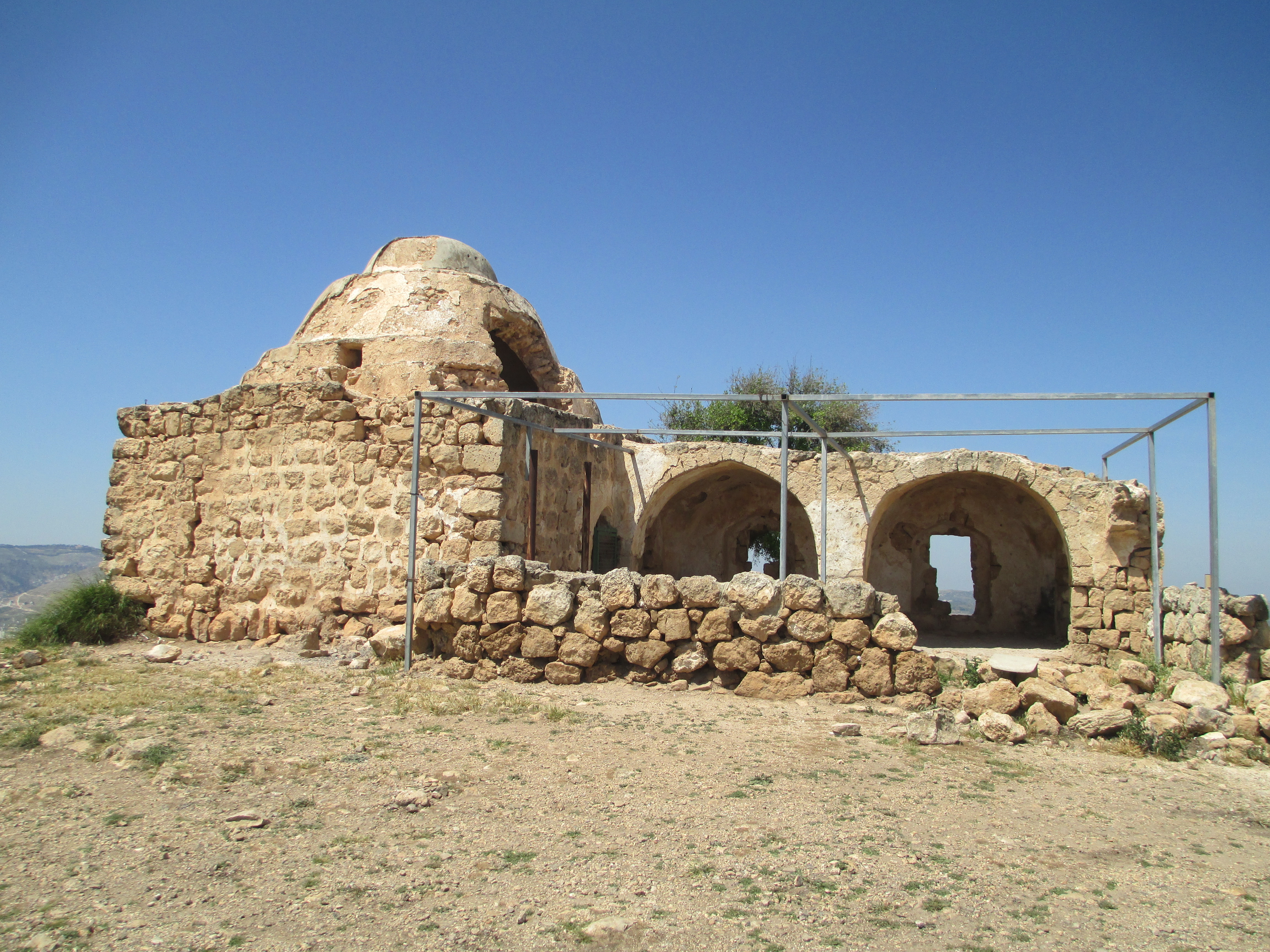 ציון שיח' בילאל על הר כביר